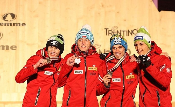 Dekoracja medalowa konkursu drużynowego mężczyzn na skoczni K-120